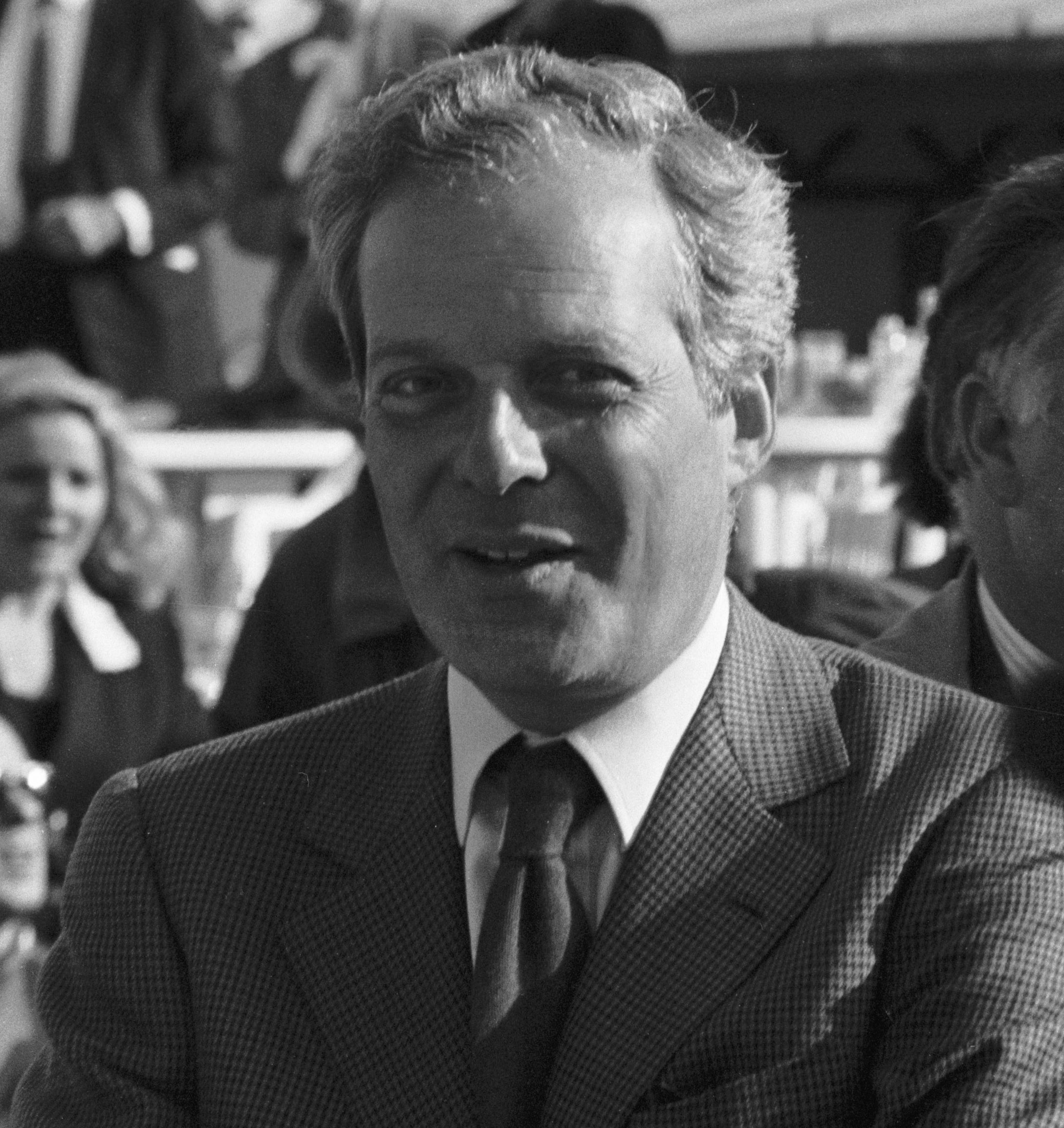 Le banquier David de Rothschild à Deauville (Normandie, France) en septembre 1989.